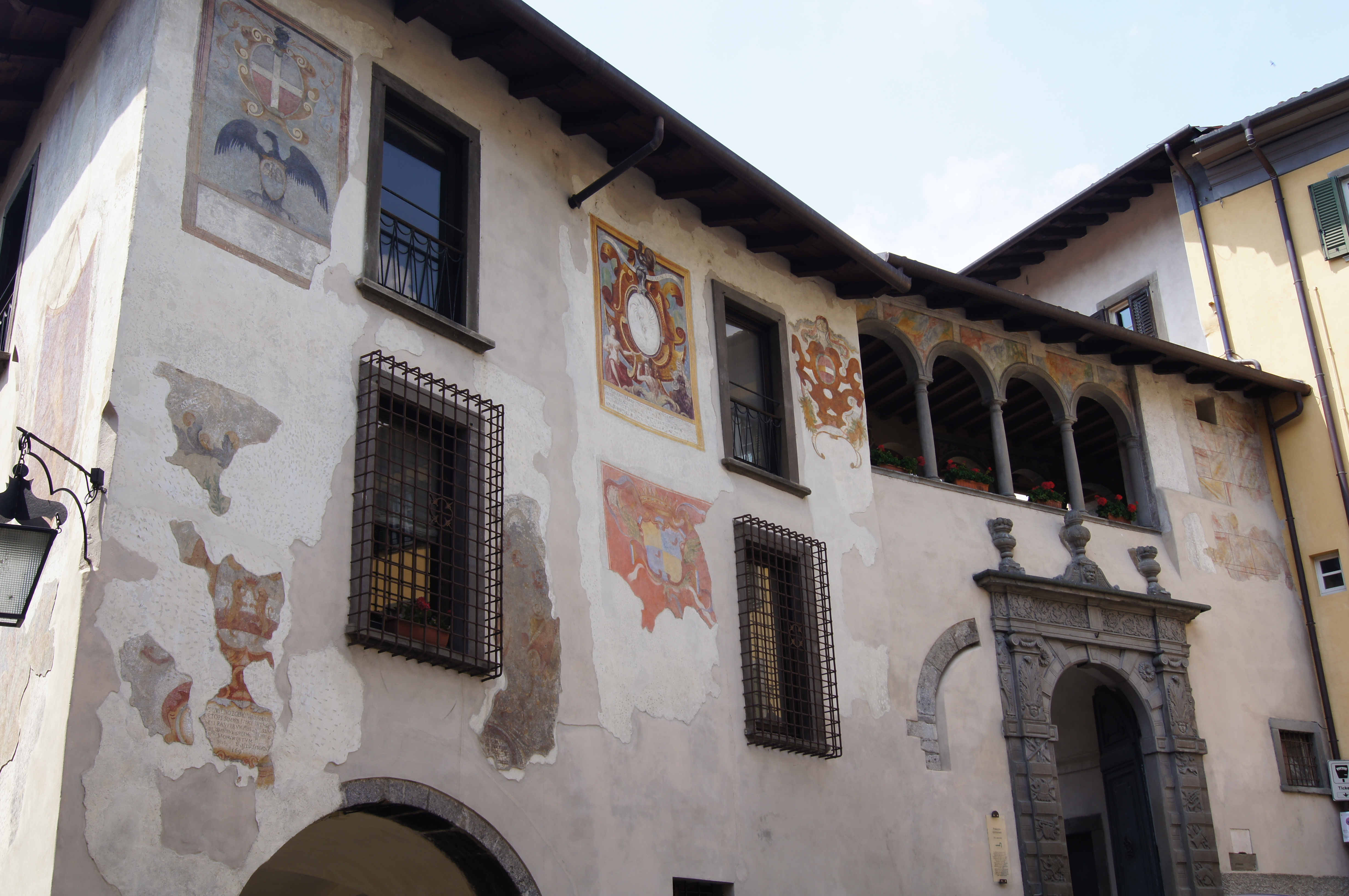 Clusone